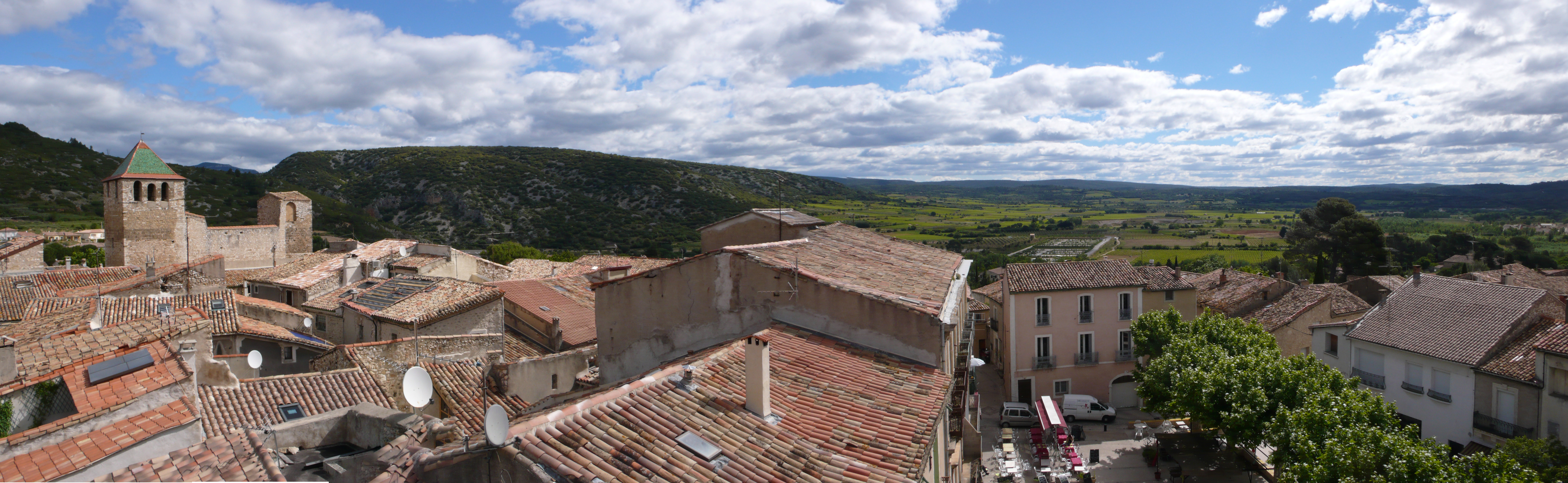 Voici un aperçu de Saint Jean de Fos, on voit le clocher de l'église, le massif de la Serrane, la place de la Mairie, et la Vallée de L'Hérault